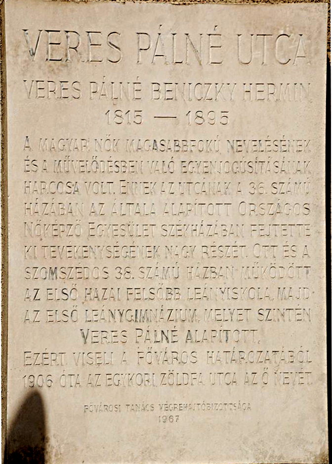 Veres Pálné emléktáblája (Veres Pálné utca 44., V. kerület, Budapest)